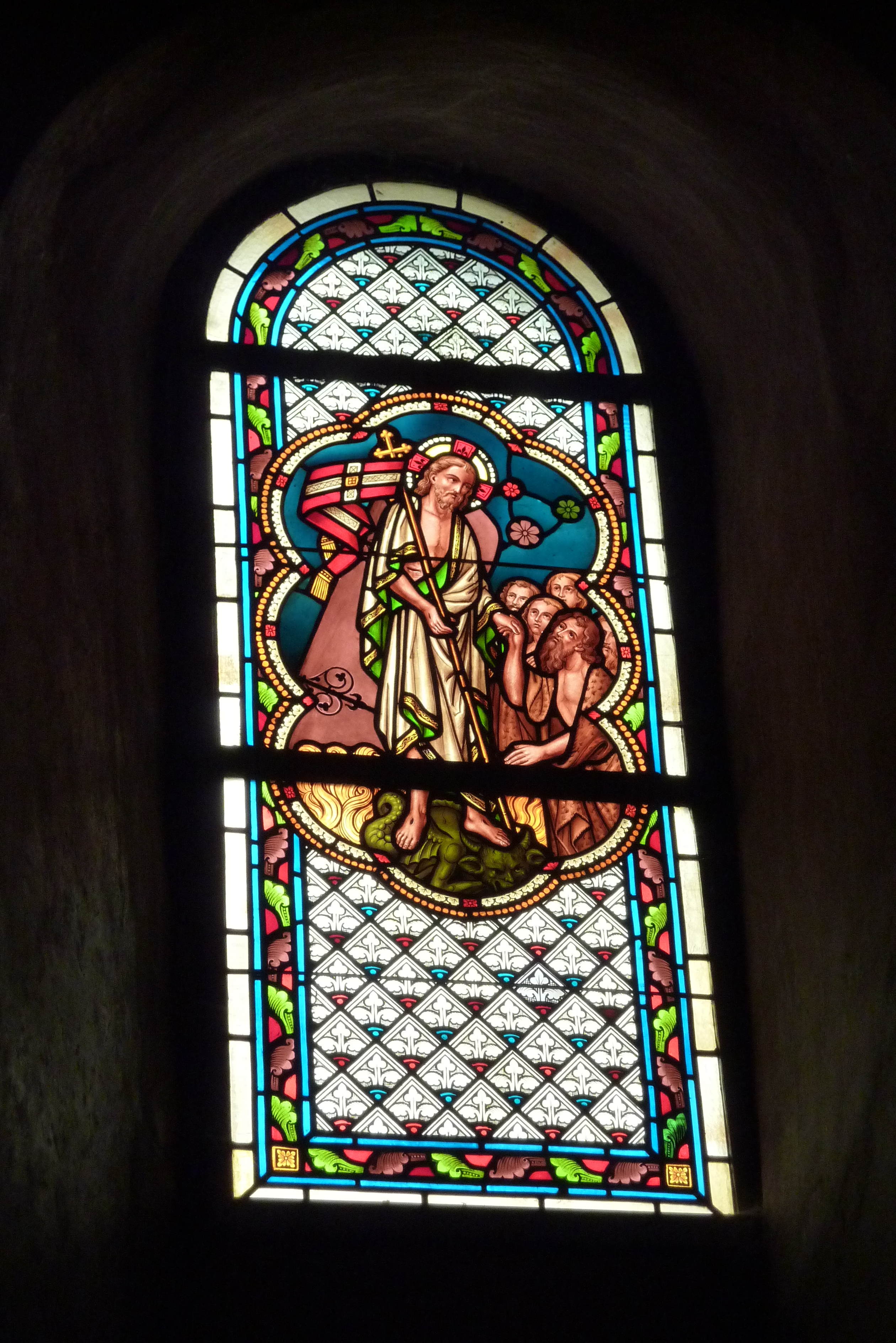 Dom zu Limburg, Bleiglasfenster an der Westseite des Kirchenschiffs, Darstellung: Auferstandene Christus